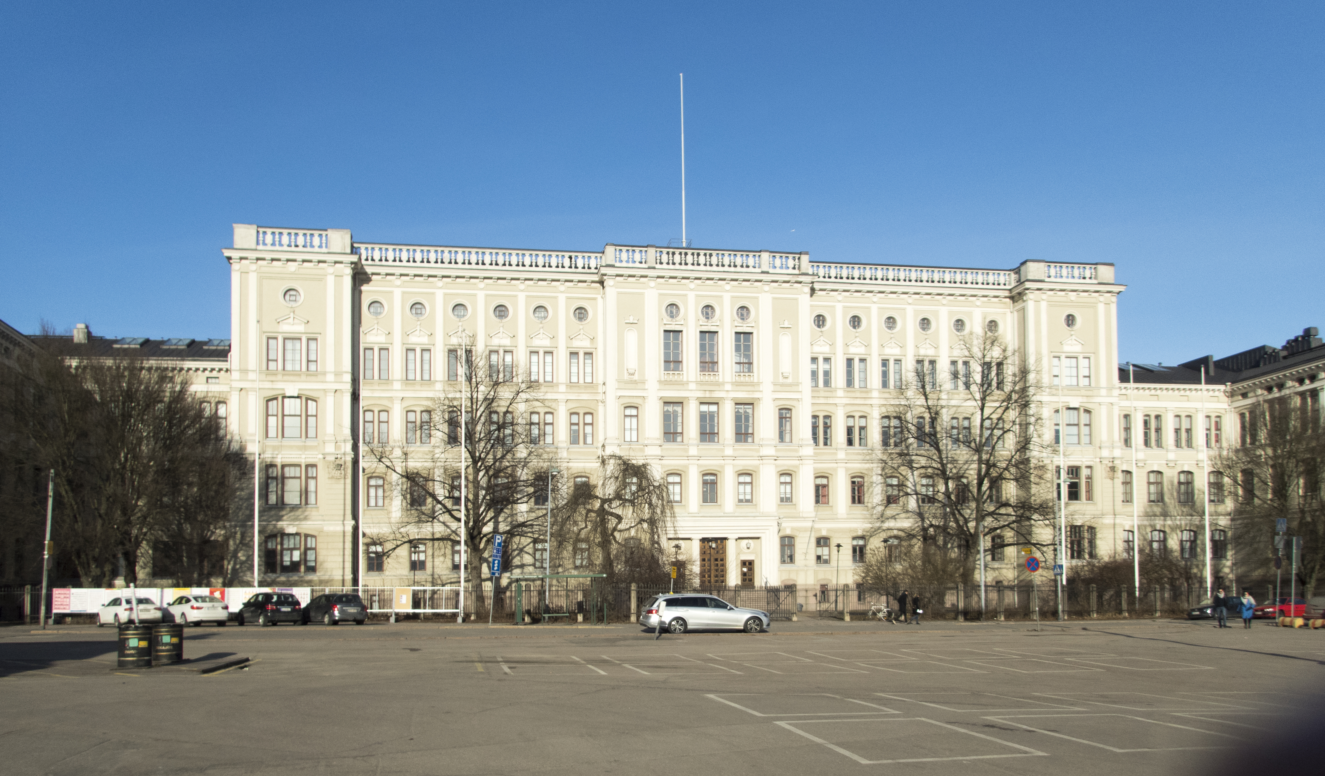 Gamla Tekniska Högskolan, Helsingfors. Byggnadsår 1877 Arkitekt Frans Anatolius Sjöström. Senare påbyggnad